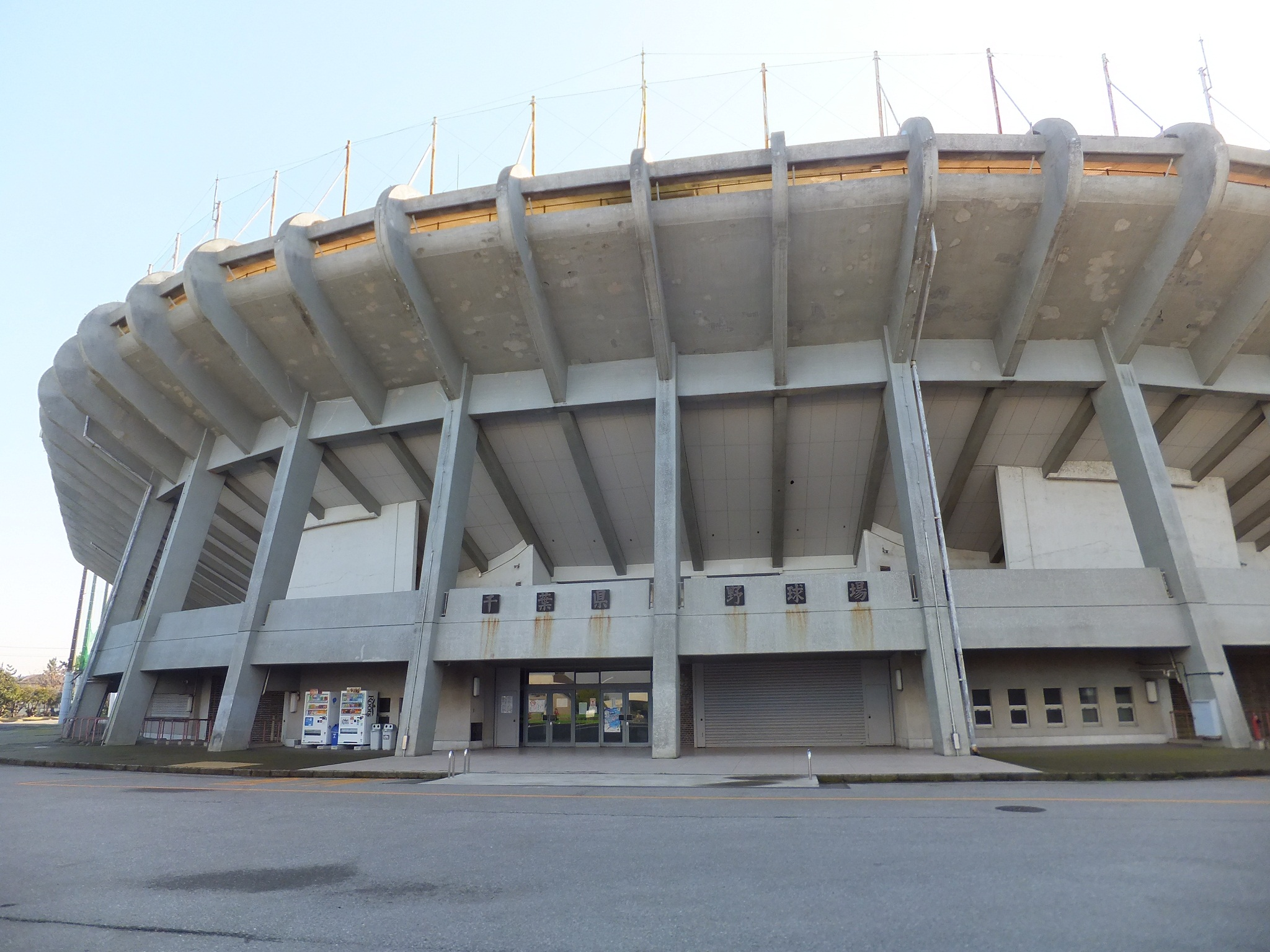 千葉県野球場（千葉県総合スポーツセンター内）